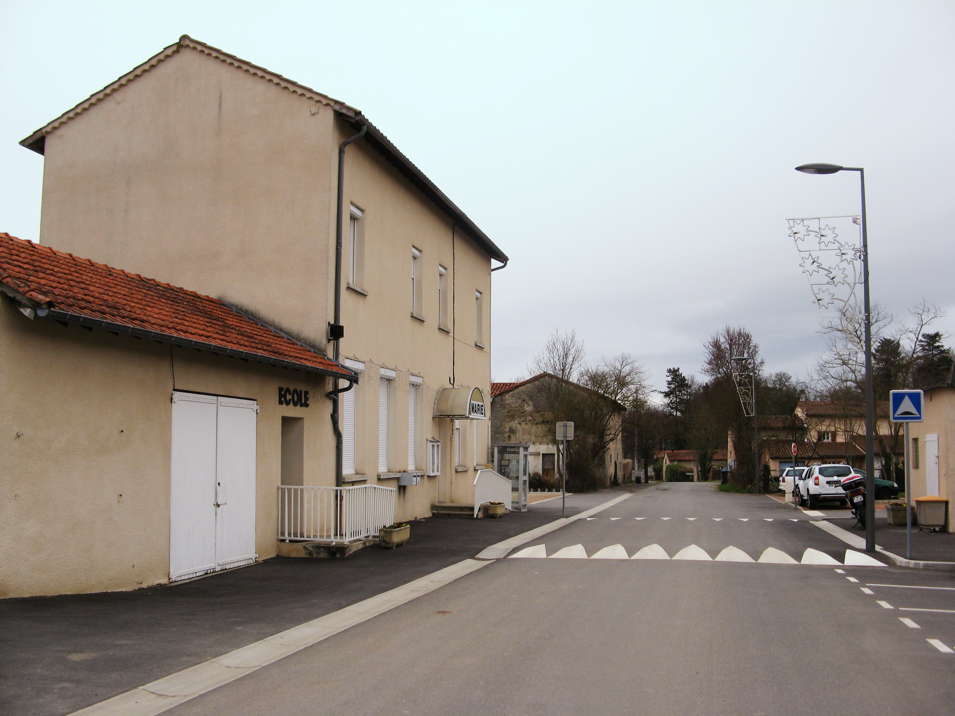 Grézieux-le-Fromental : mairie